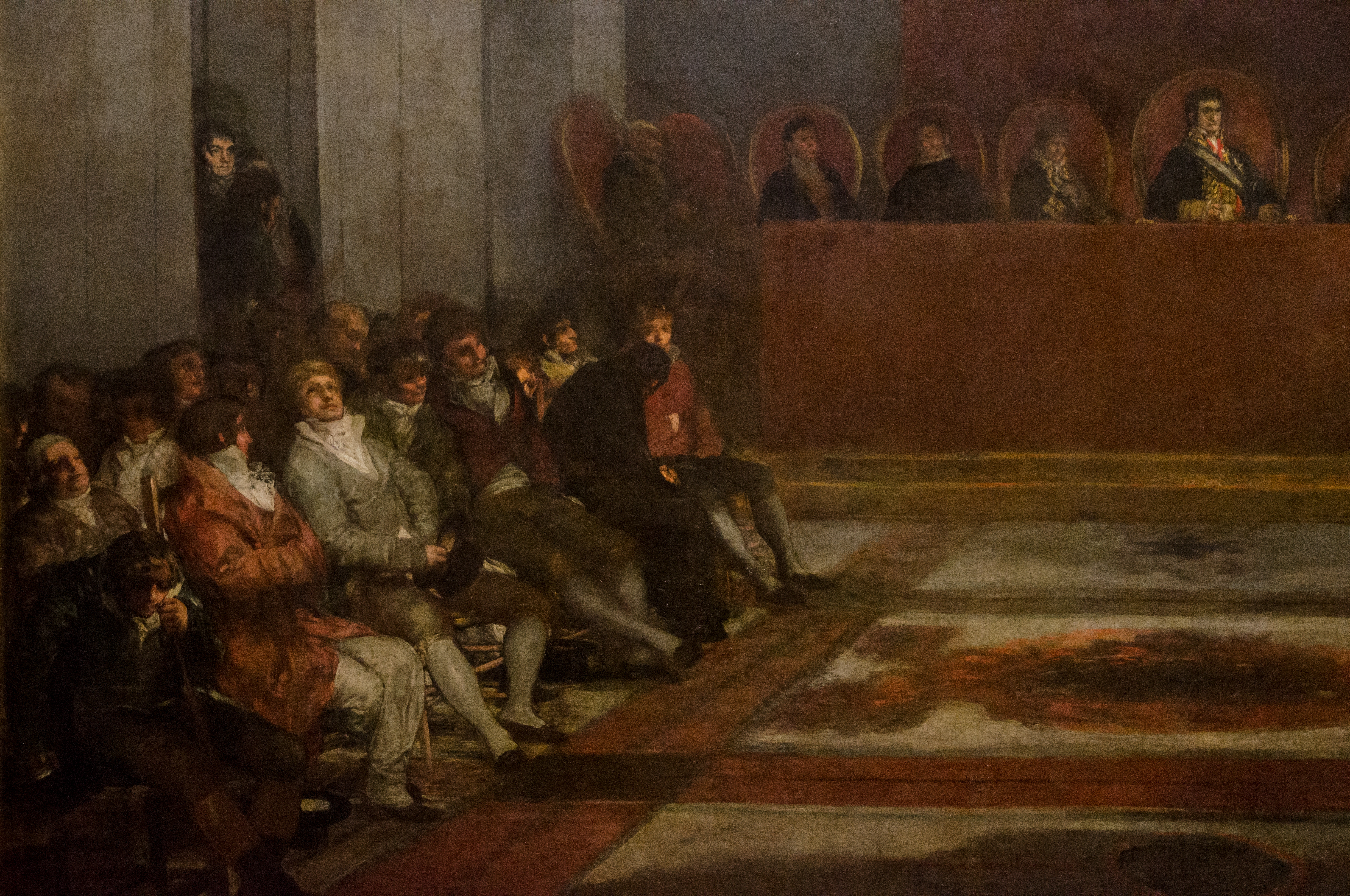 L'Assemblée de la Compagnie Royale des Philippines (fragment), par Francisco de Goya, vers 1815, huile sur toile (Musée Goya, Castres)